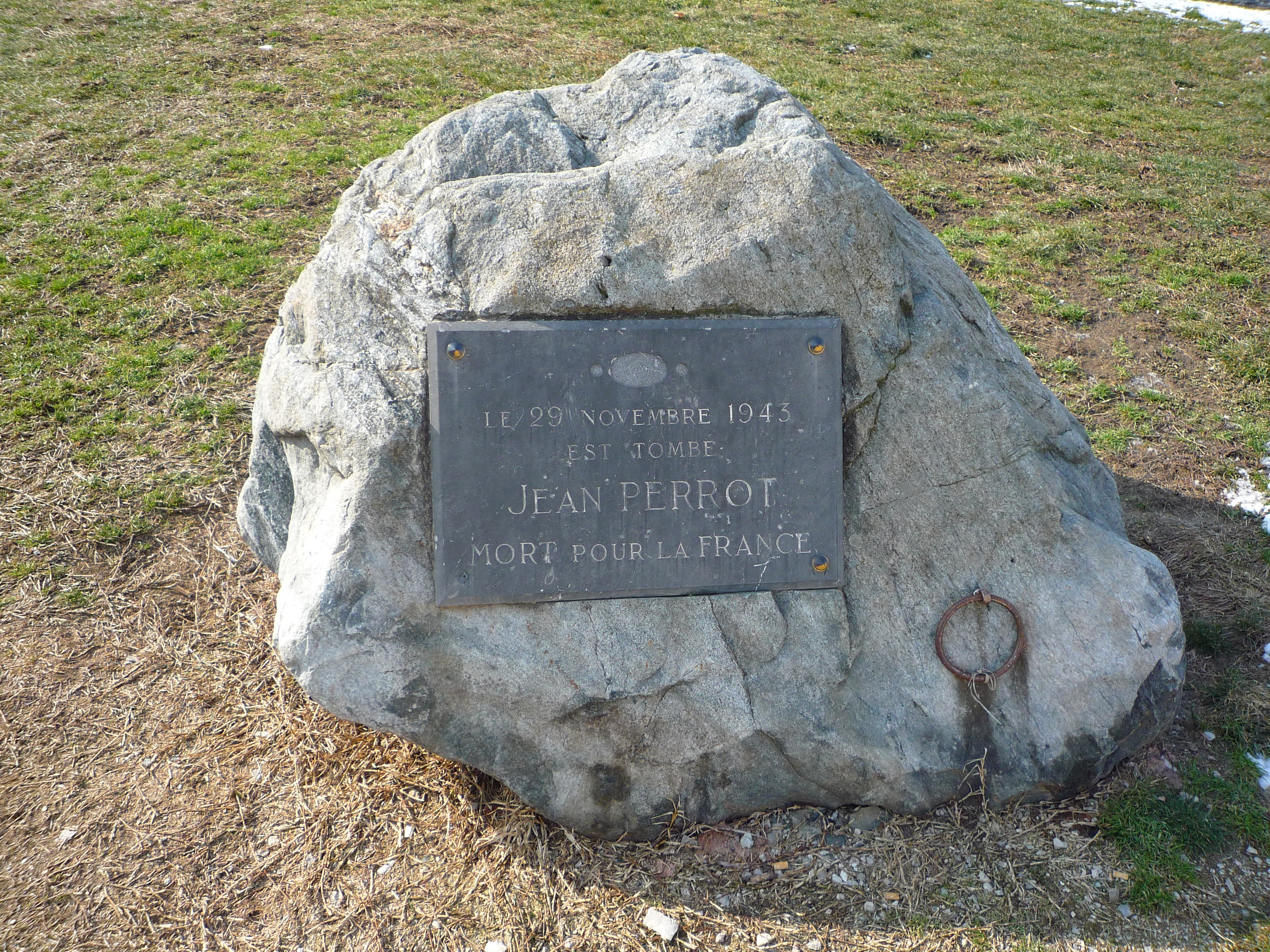 Plaque commémorative du résistant Jean Perrot (1904-1943), 50 avenue Jean Perrot - Grenoble.